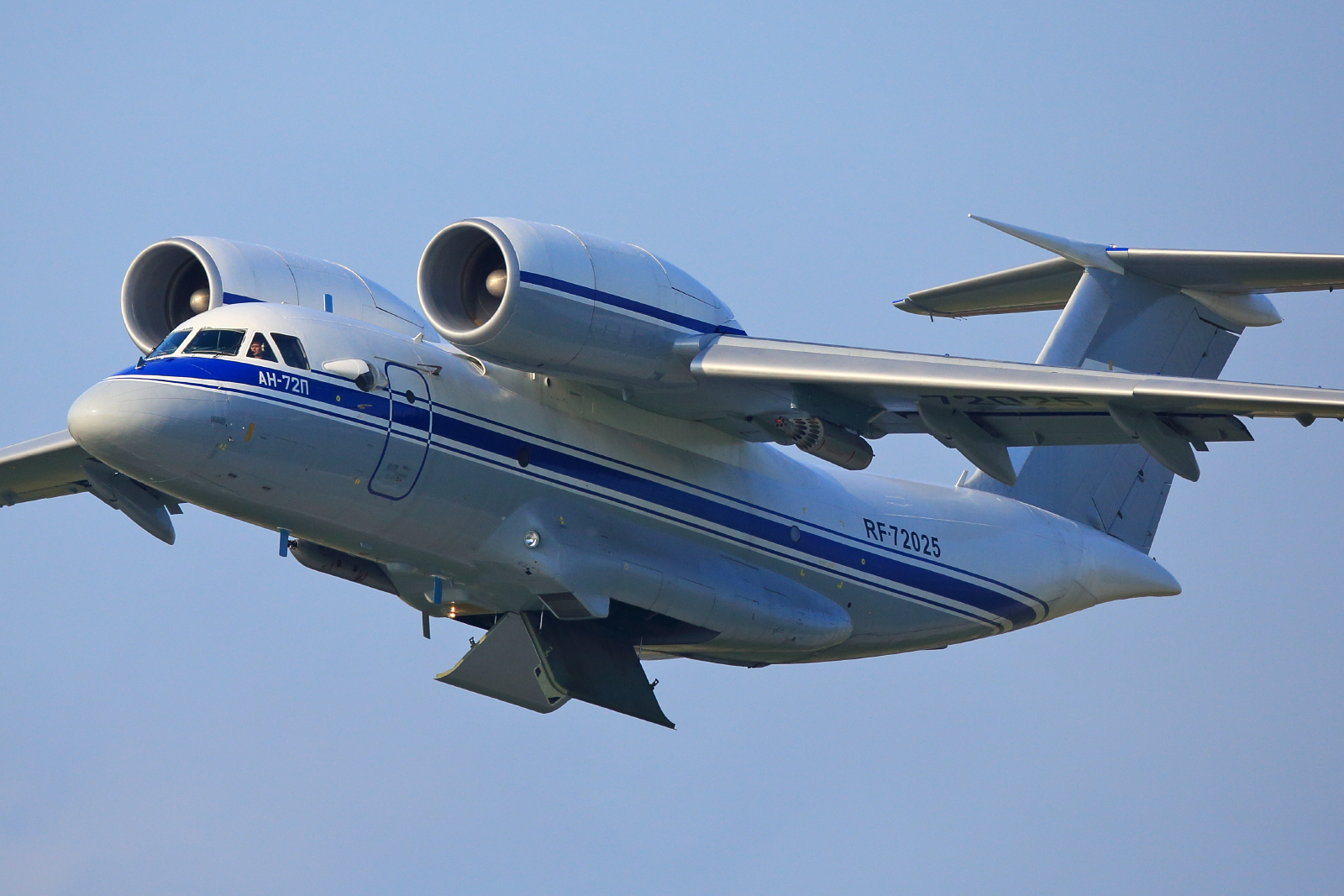 VVO_9577